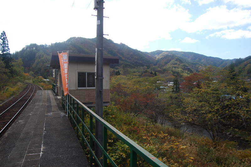 ホームより撮影2009年10月